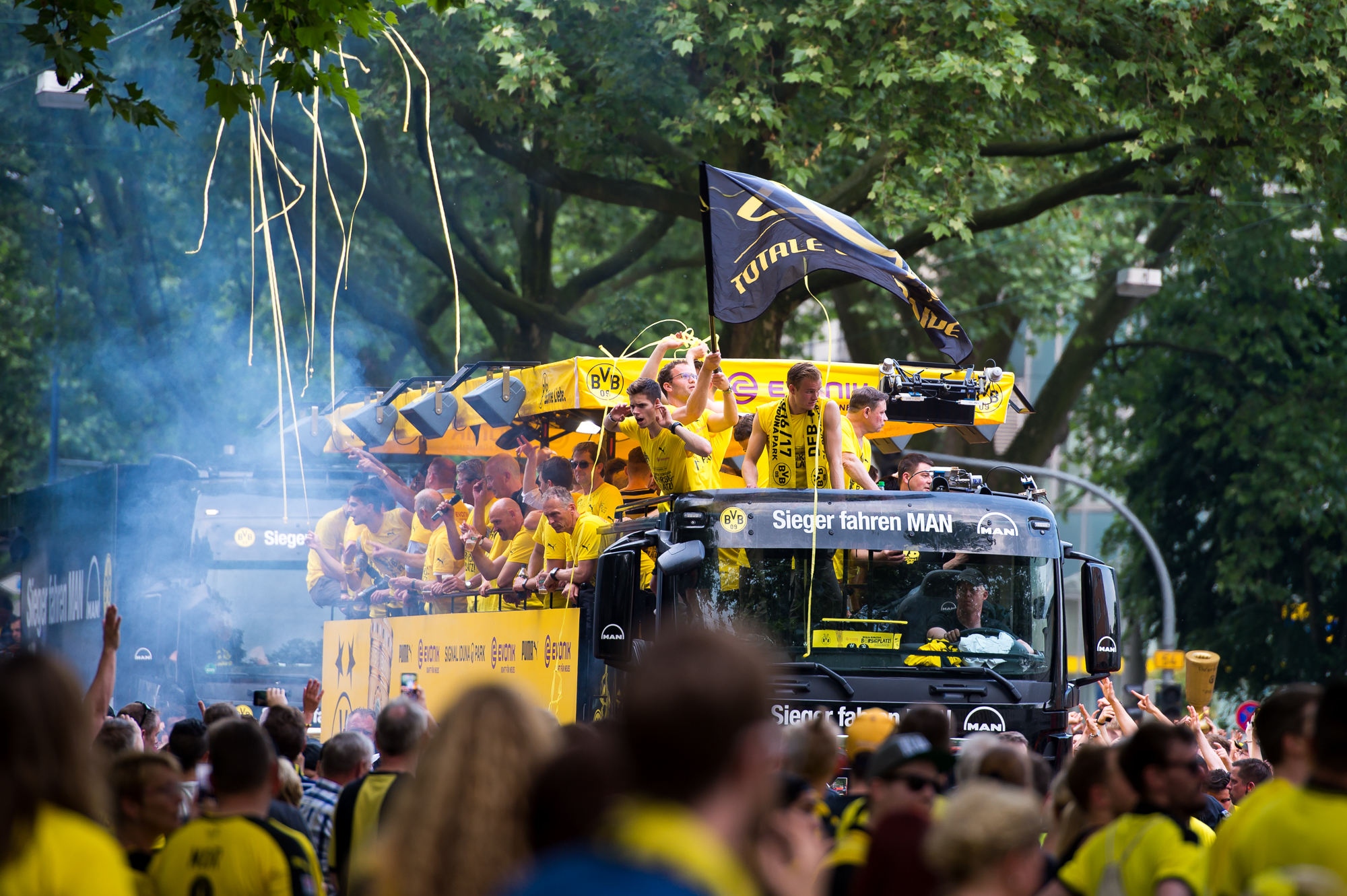 BVB Pokalfeier 2017